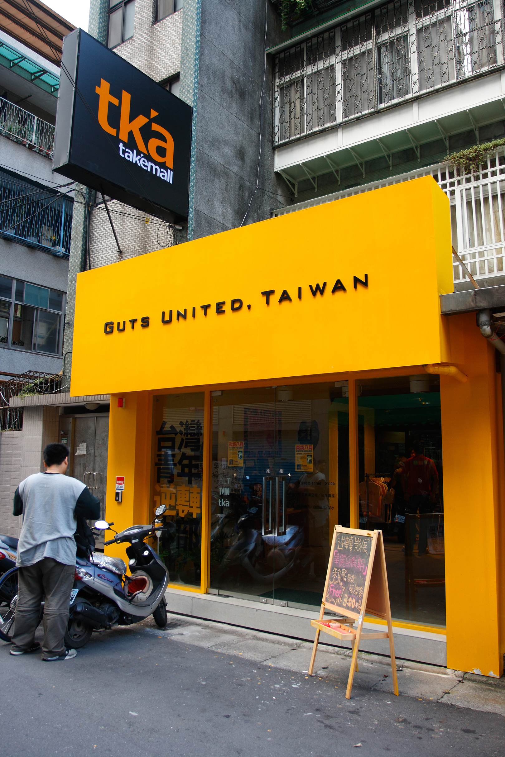 台肯會社有限公司、台灣青年逆轉本部原址，位於臺灣臺北市大安區辛亥路一段34巷3號1樓。